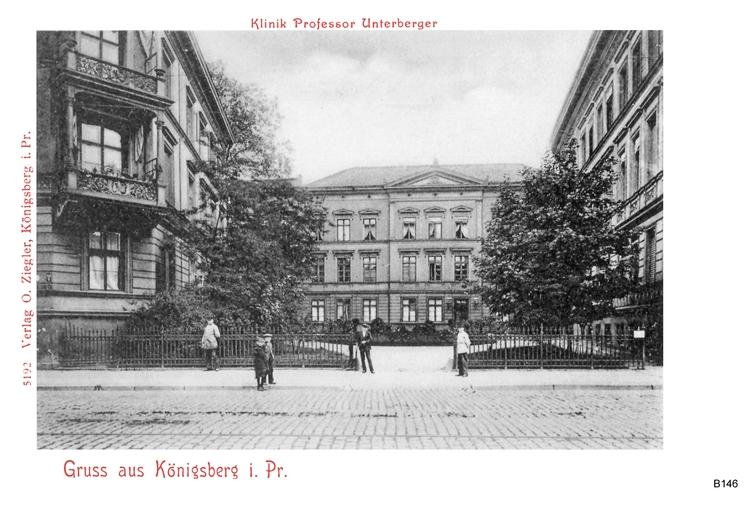 Fotografie der Frauenklinik Unterberger in Königsberg i. Pr.